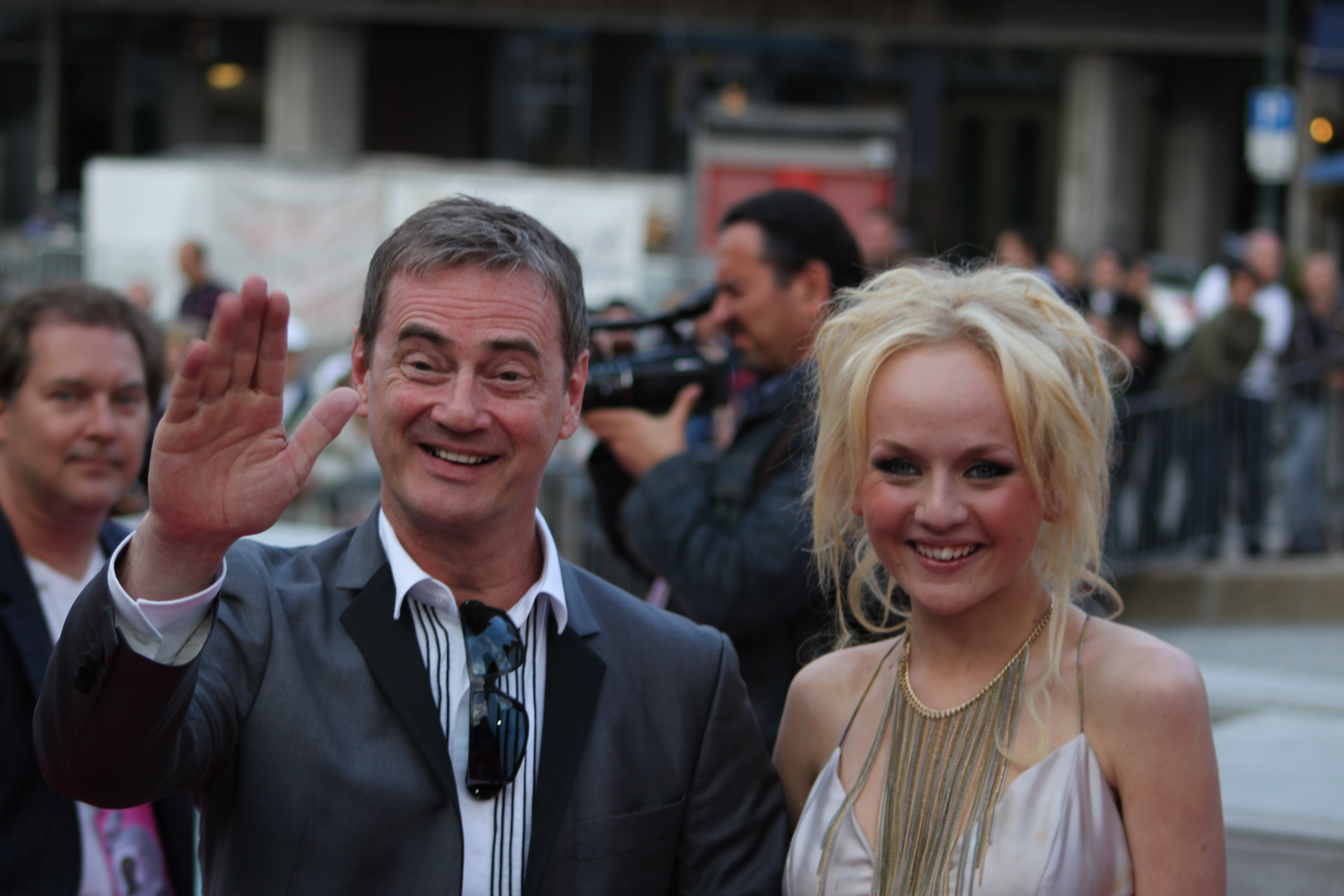 Foto: Vincent Hasselgård, Aktiv I Oslo.no